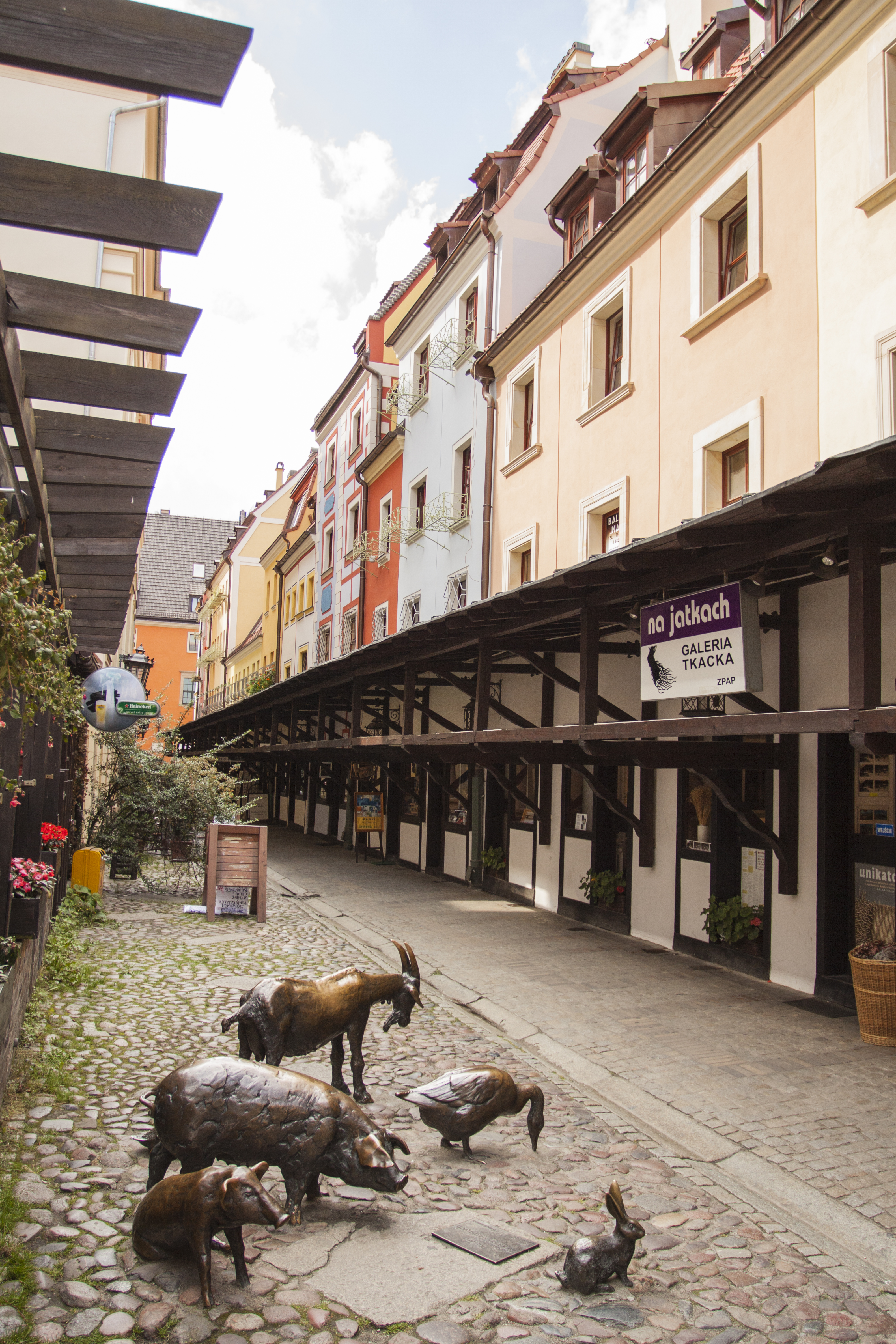 Denkmal der Schlachttiere, Große Fleischbänke, Wrocław (Breslau), Niederschlesien, Polen.